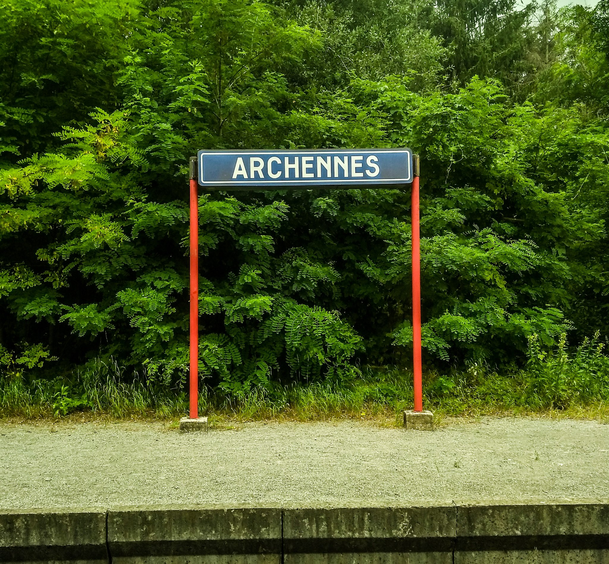 Archennes